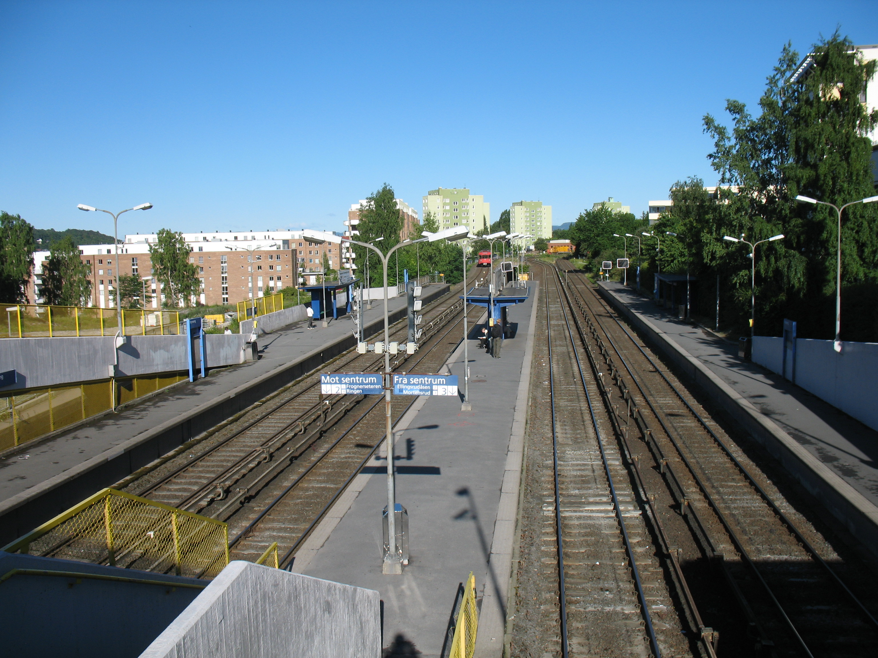 Brynseng T-bane, Oslo